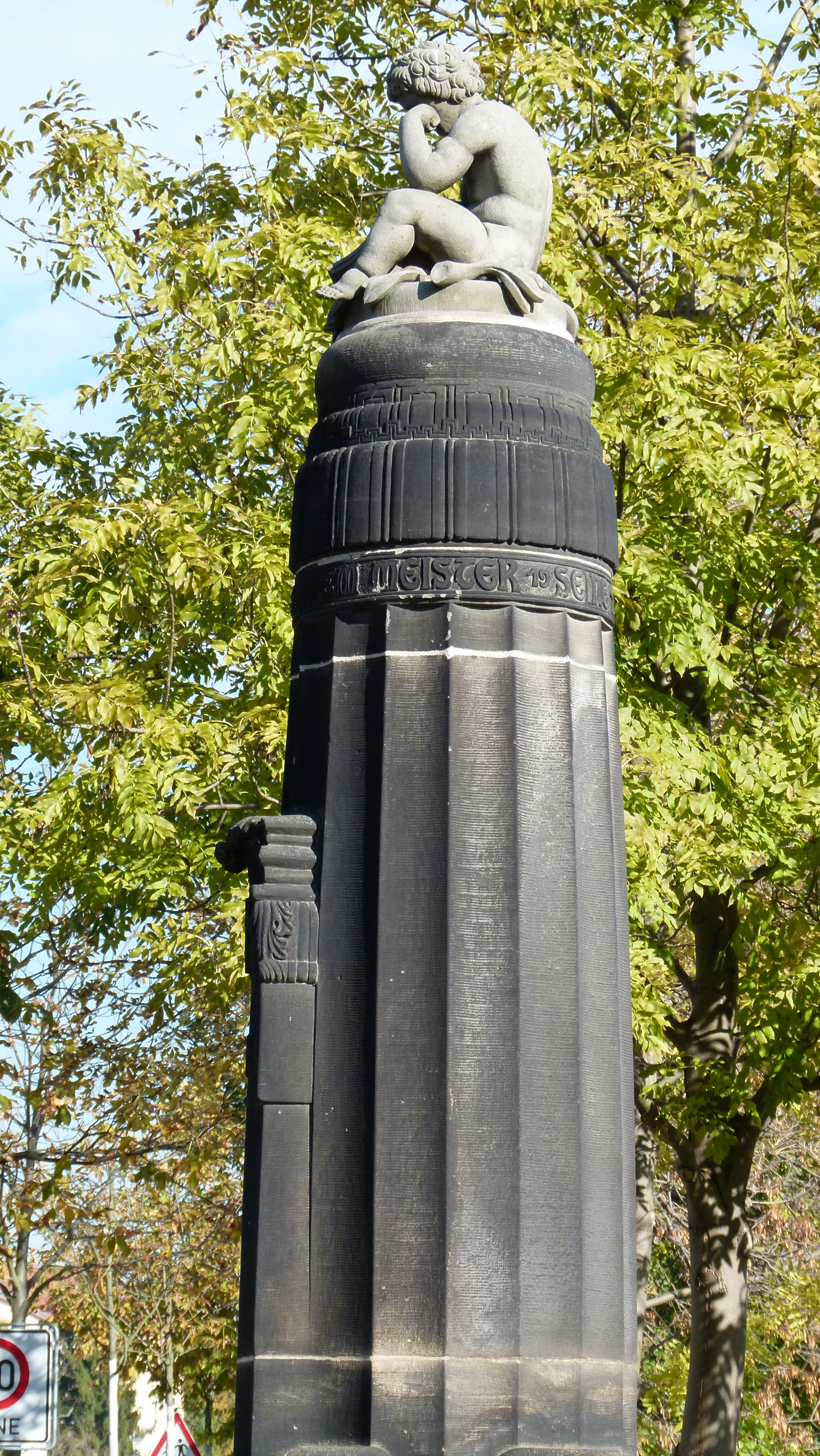 Denkmal für Constantin Lipsius in Dresden-Striesen, Lipsiusstraße / Stübelallee, 1913 von Architekt Richard Michel